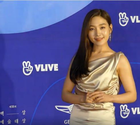 5월 1일 오후 서울시 강남구 삼성동 코엑스에서 제 55회 백상예술대상 시상식 레드카펫 행사가 열렸다.